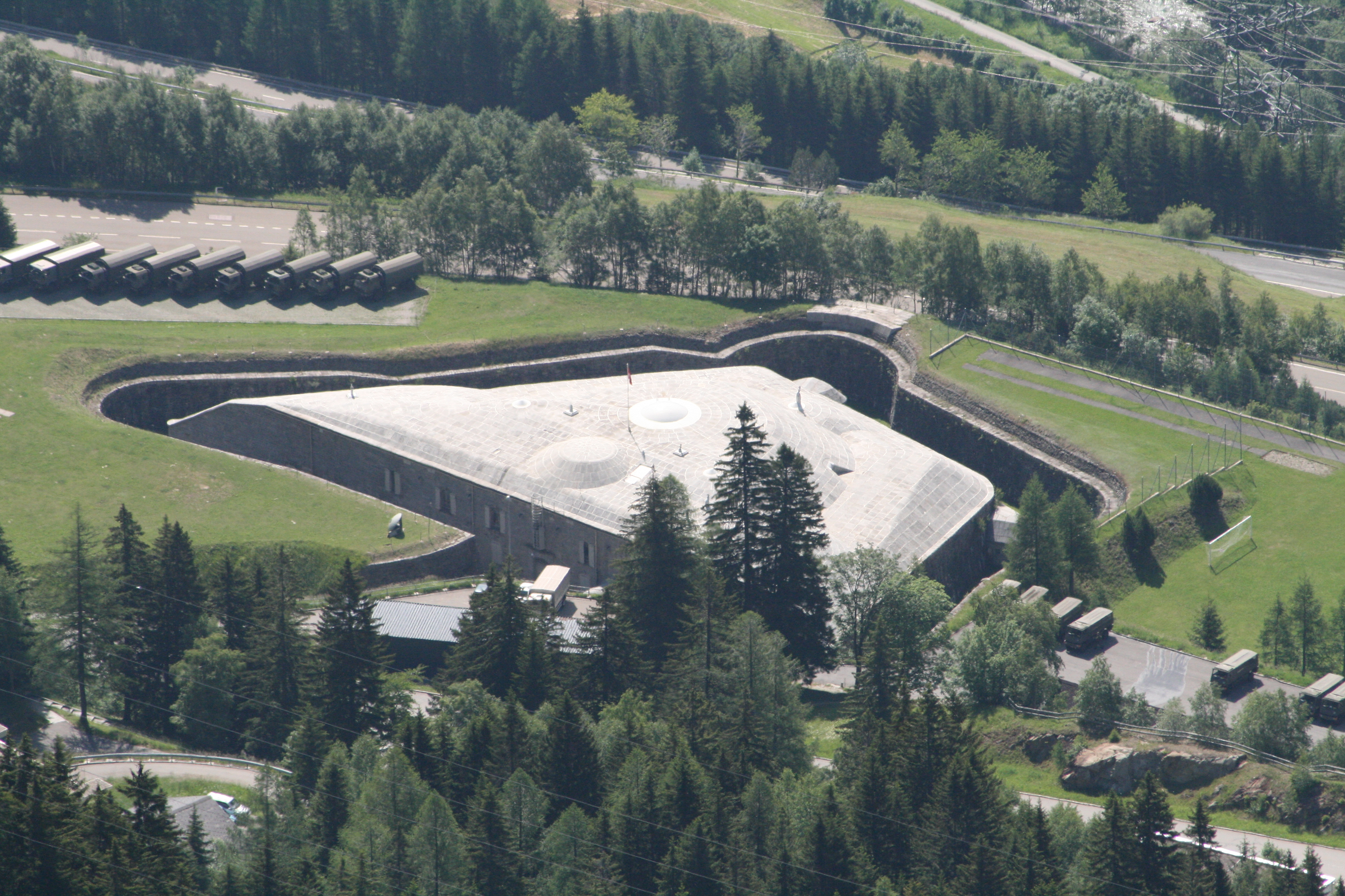 Das Fort Airolo